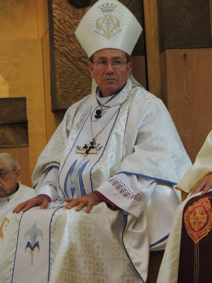 Mons. Sigifredo